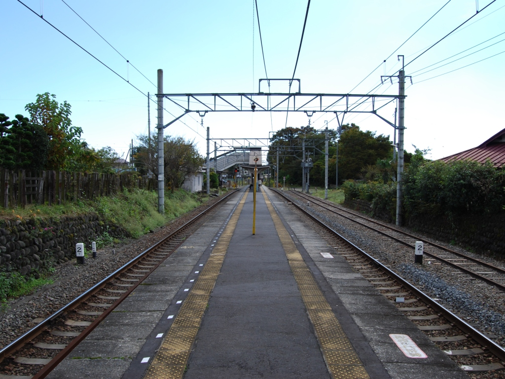 東武鉄道鬼怒川線新高徳駅ホーム全景（2008/10/28撮影）